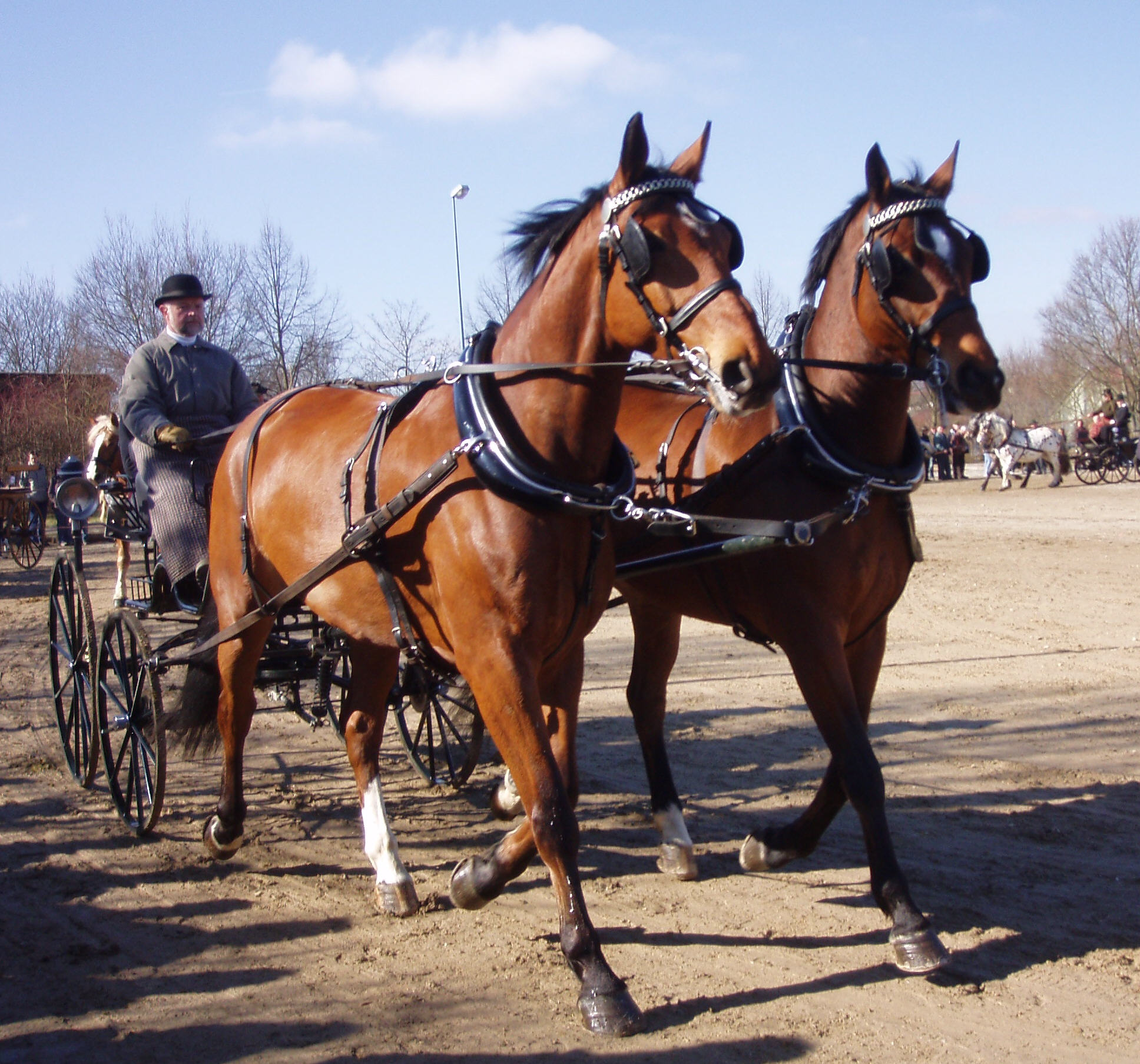 Pferdemarkt Bernhausen